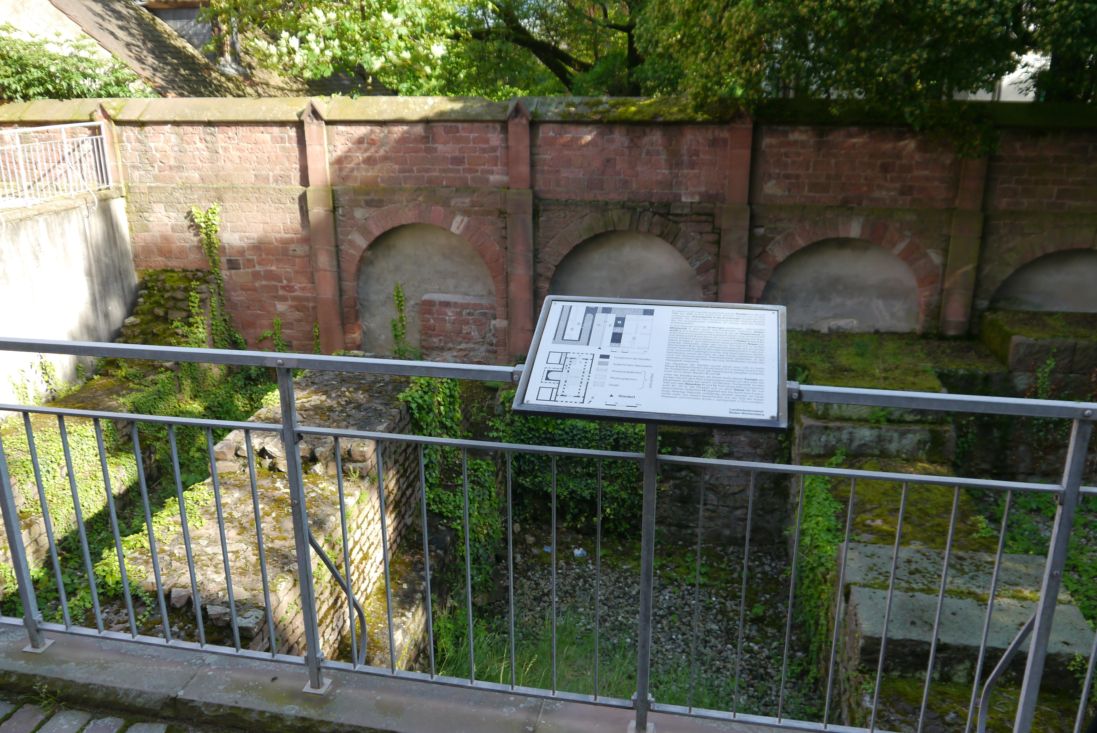 Marktbasilika in Ladenburg (Grabungsausschnitt vor der Südseite von St. Gallus in Ladenburg, Deutschland)